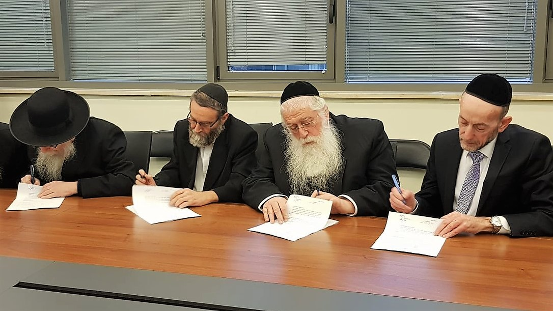 ראשי יהודות התורה חברי הכנסת ליצמן, גפני, פרוש ומקלב חותמים על ההסכם בין דגל התורה לאגודת ישראל בלשכת ח"כ גפני בכנסת ערב הבחירות לכנסת ה21